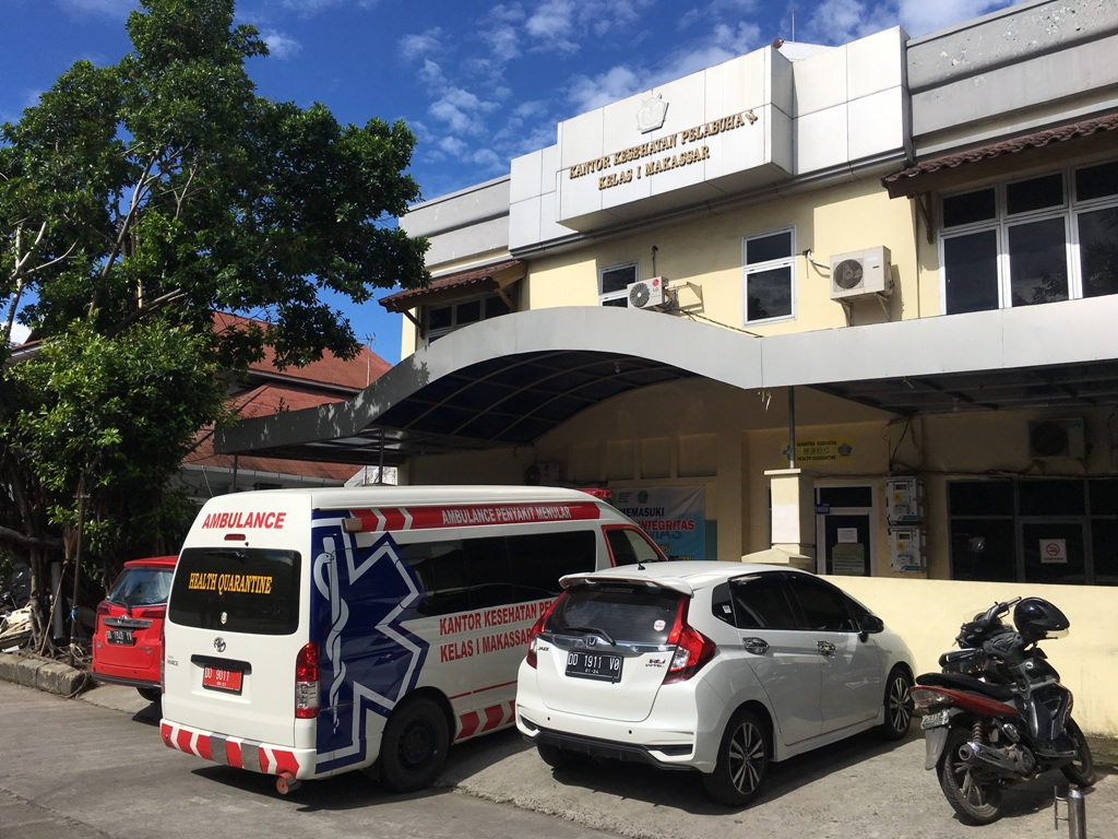 Tampak depan Kantor Kesehatan Pelabuhan (KKP) Kelas I Makassar di Pelabuhan Laut Soekarno-Hatta Makassar, Sulawesi Selatan.